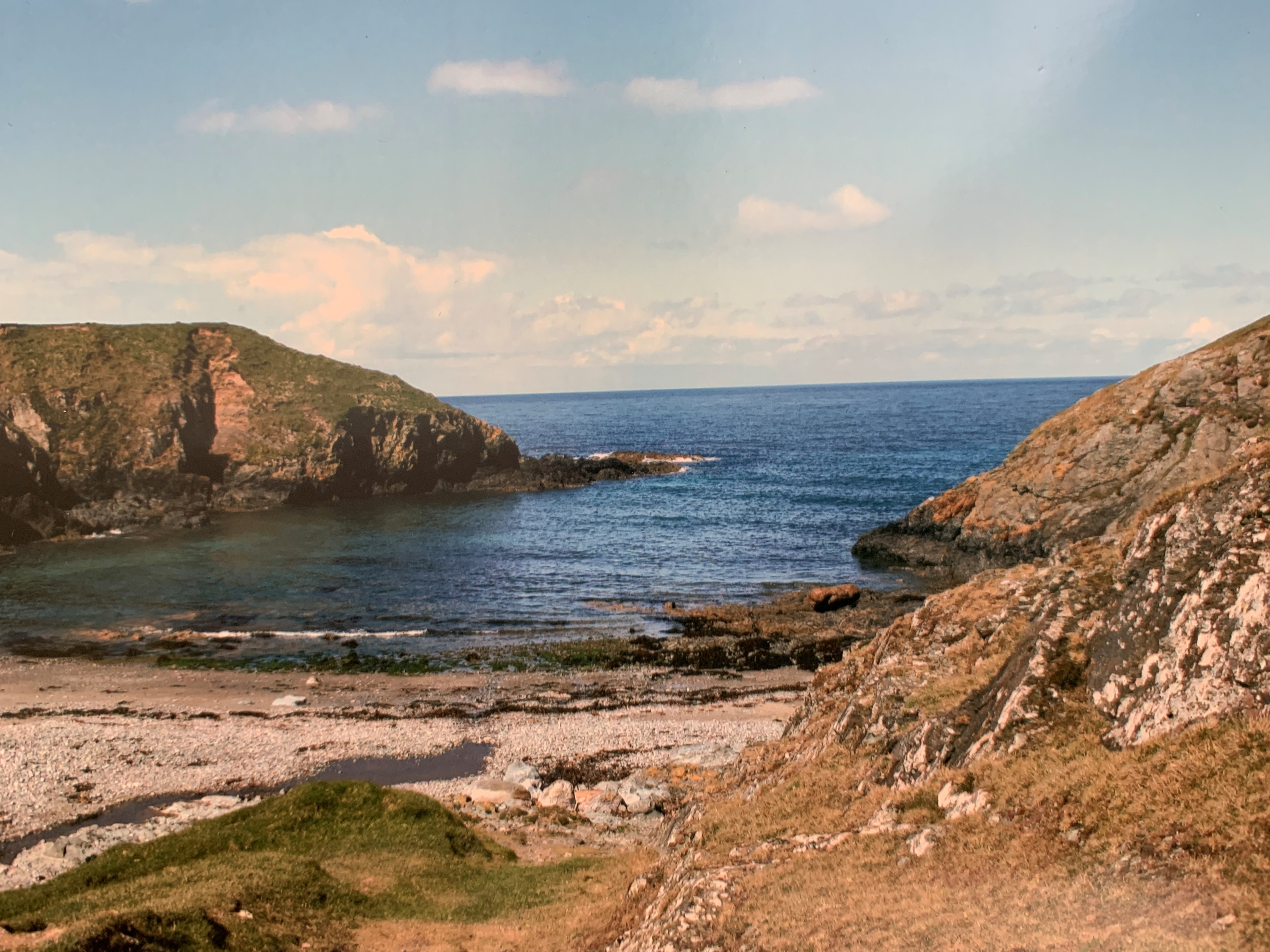 Porth Ychain